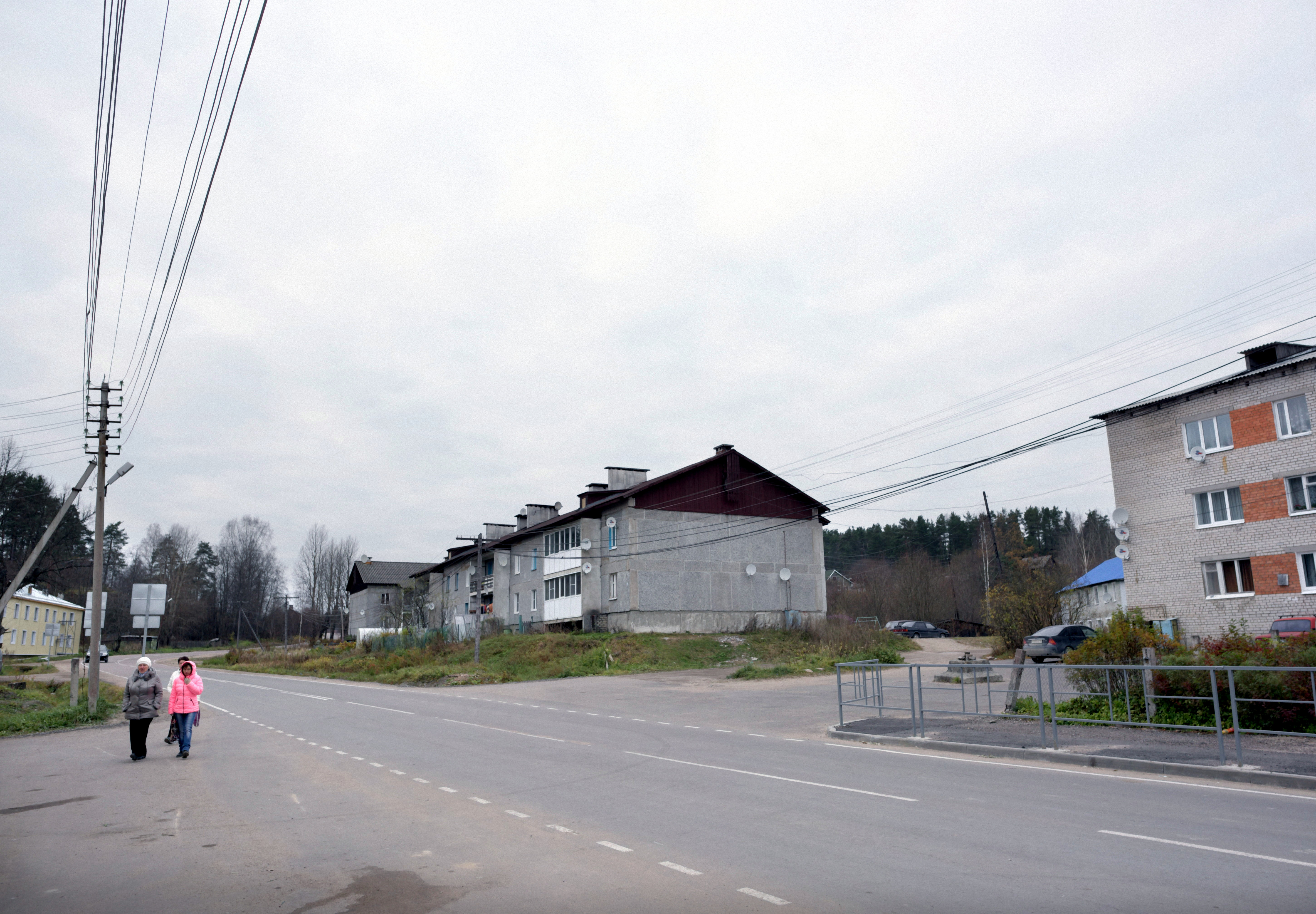 Hiitola (Хи́йтола) October 23rd 2016